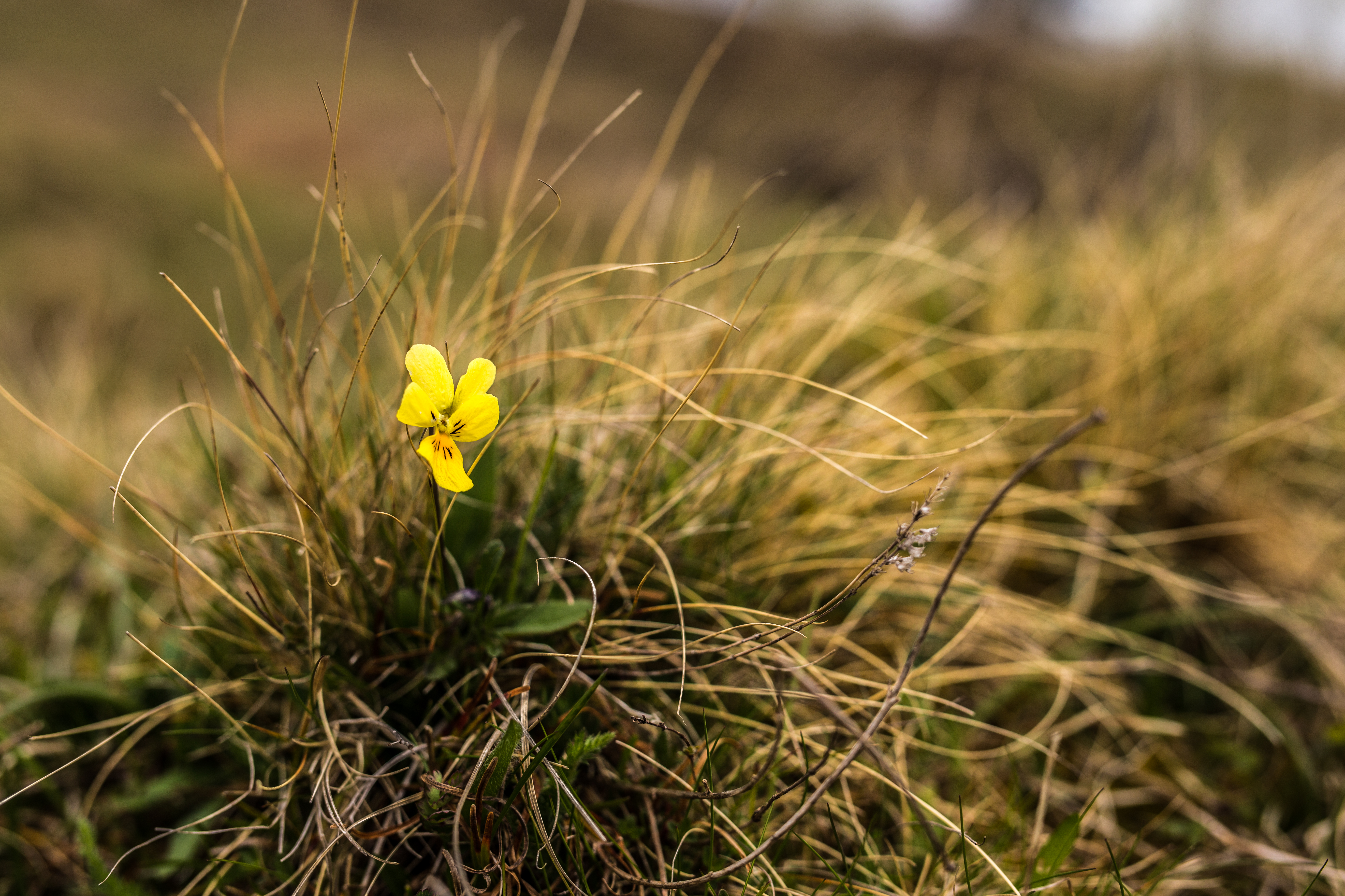 Gelbes Galmei-Veilchen (Viola calaminaria) am Schlangenberg im Naturschutzgebiet „Schlangenberg“, Stolberg-Breinig, Städteregion Aachen